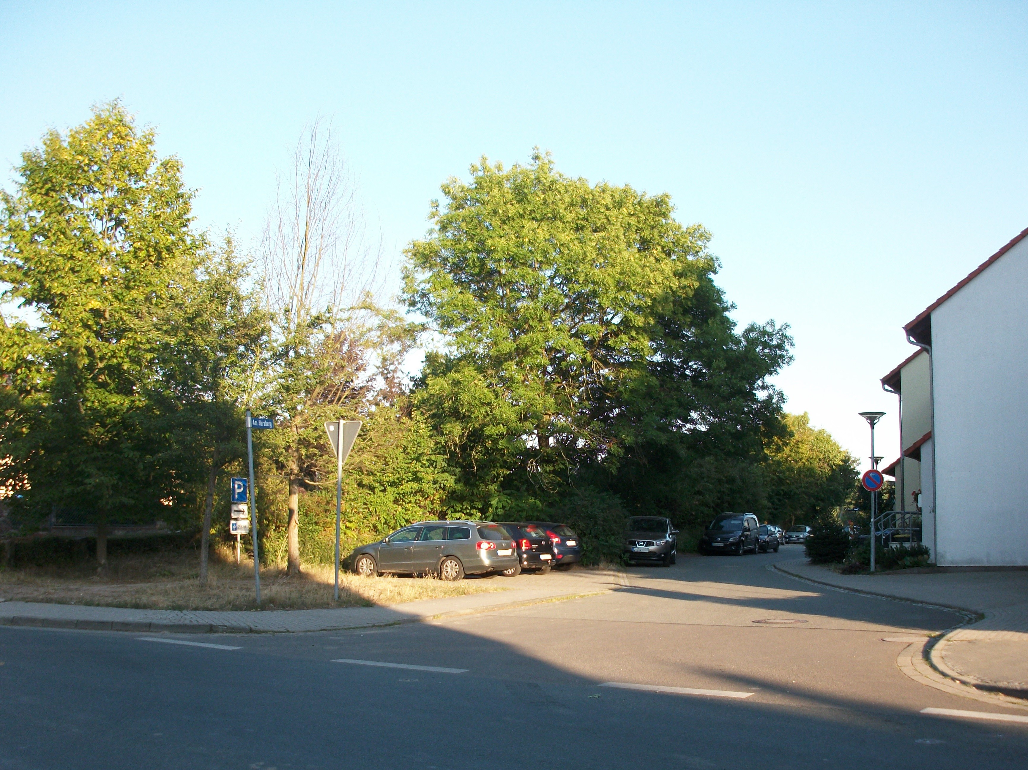 Ehemaliger Haltepunkt Frohburg Ost (2018)